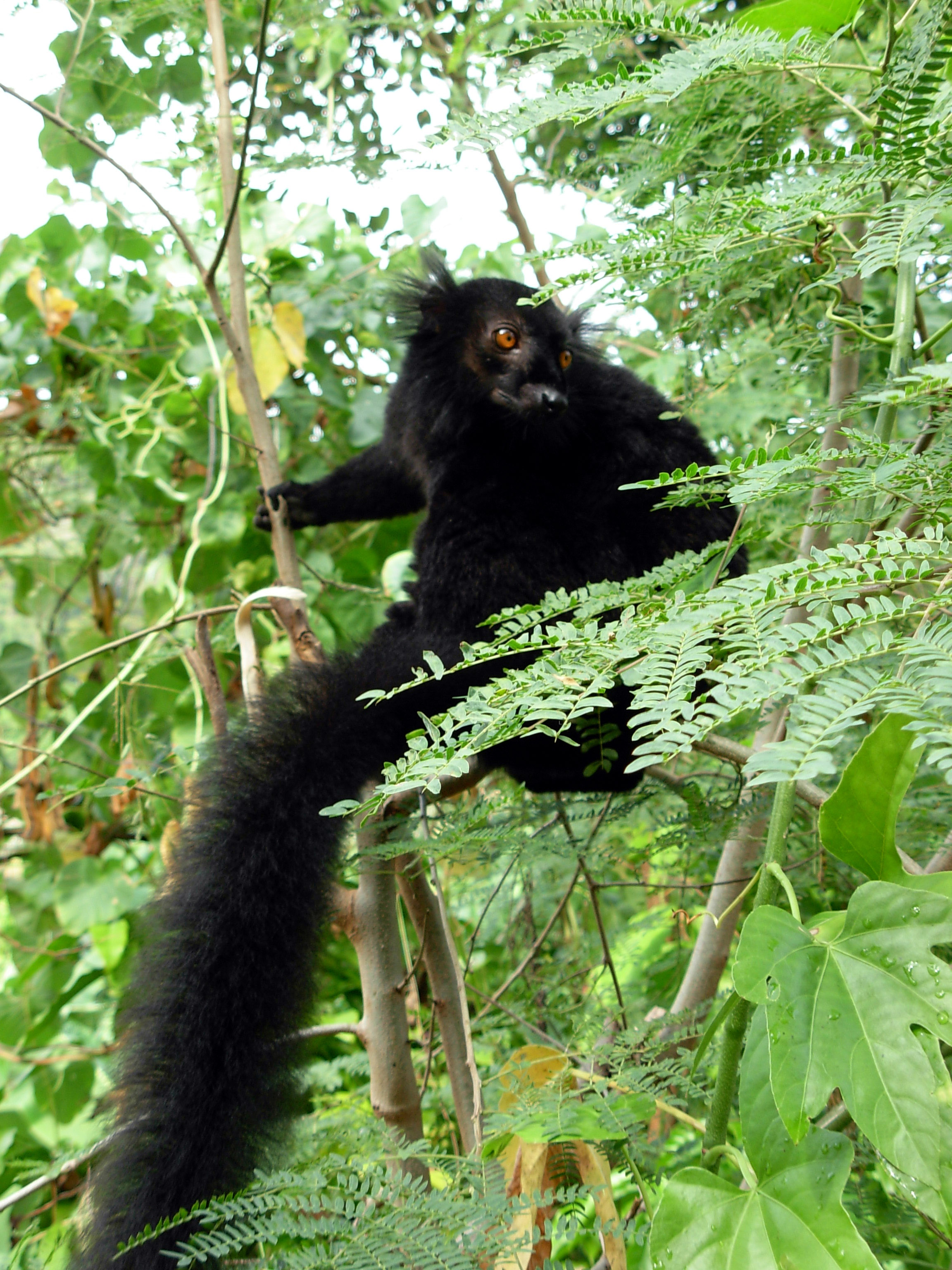 Image d'un maki sur l'île de Nosy Komba, à Madagascar